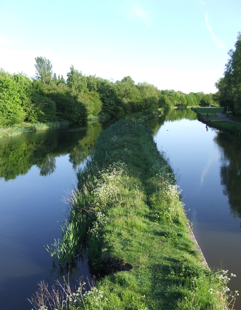 Sankey Canal and Sankey Brook, May 2007